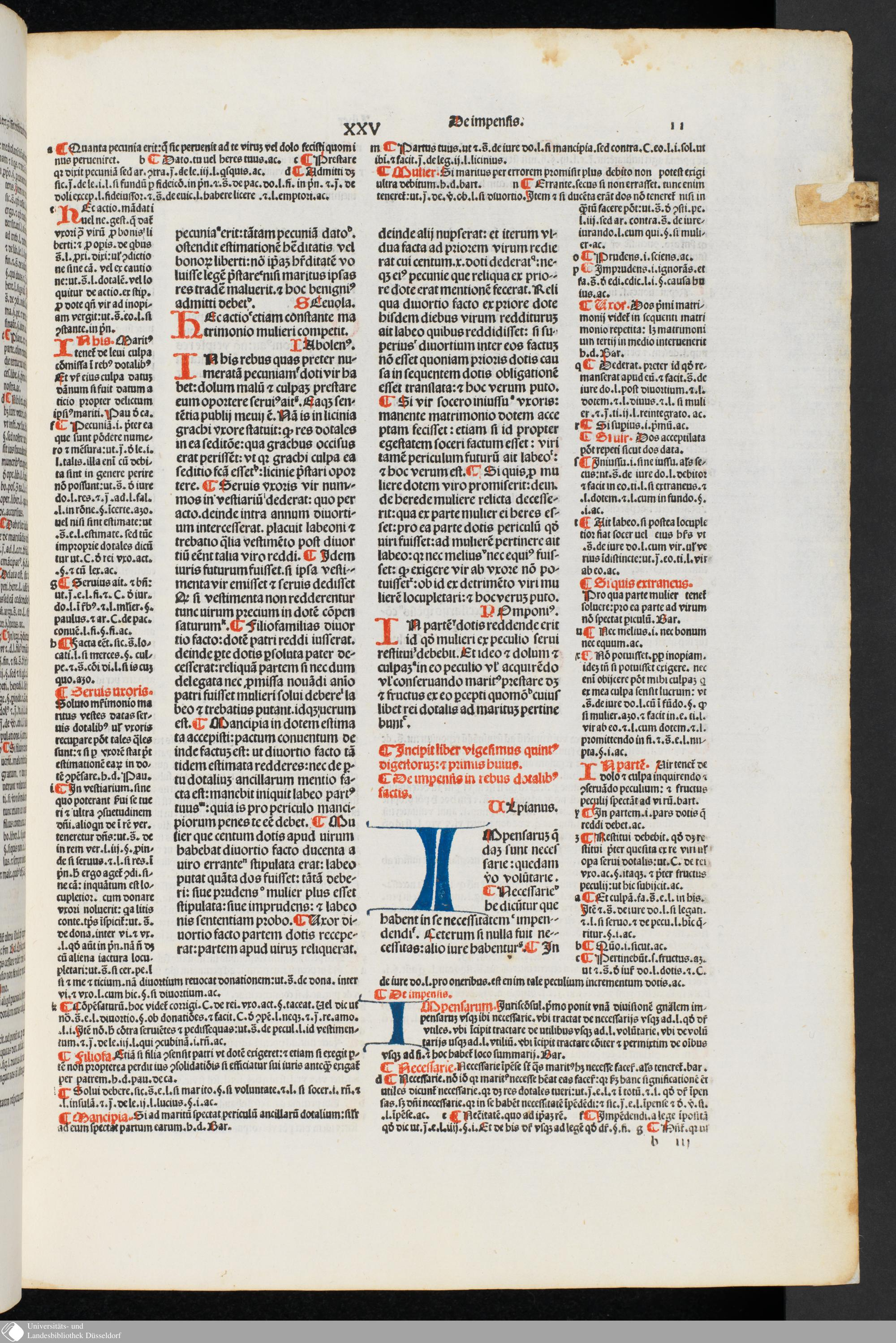 Corpus iuris civilis : Digesta Justiniani. Infortiatum. Mit der Glossa ordinaria des Accursius und mit Summaria des Hieronymus Clarius